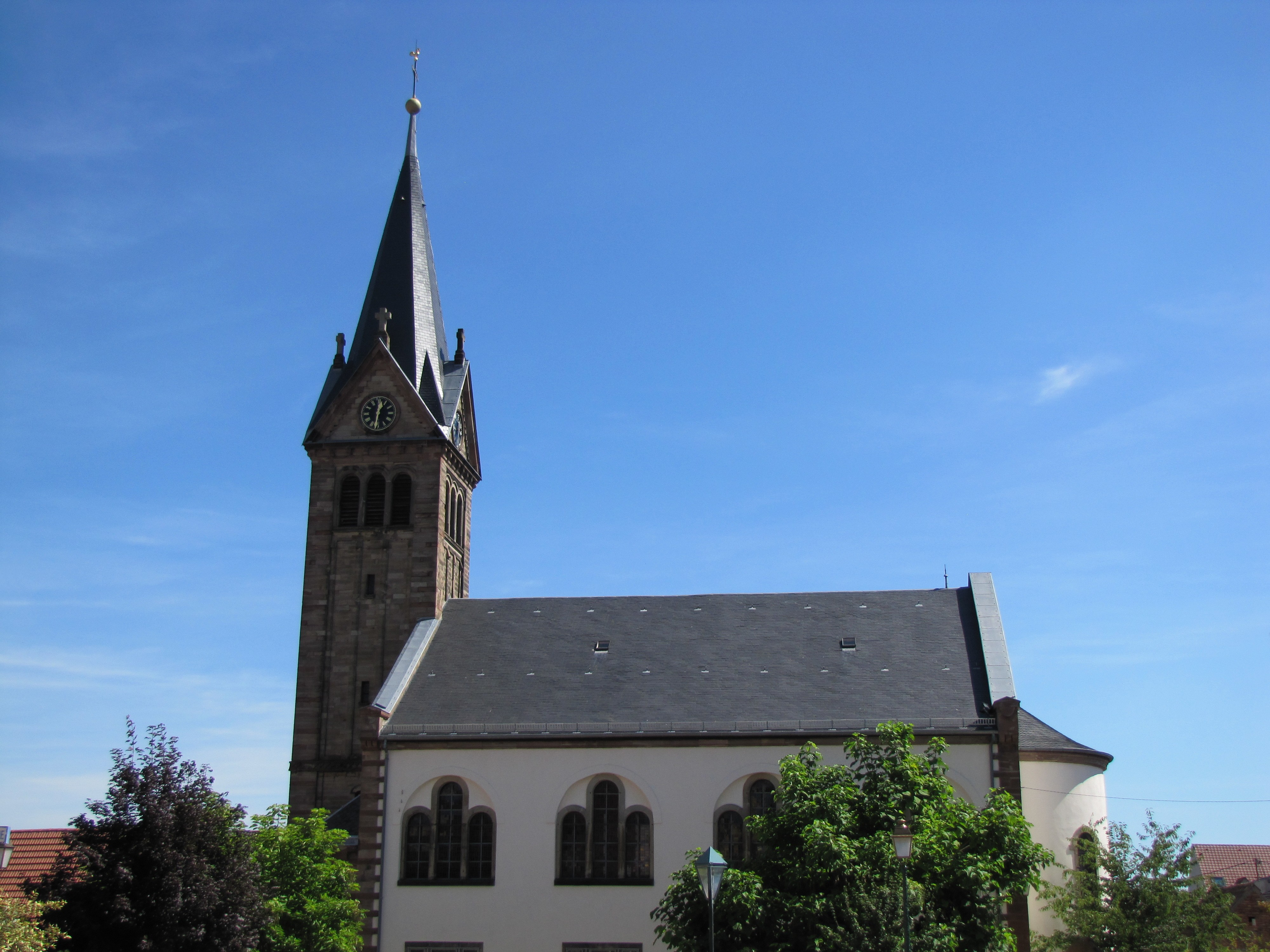 Alsace, Bas-Rhin, Pfaffenhoffen, Église protestante (1884) (IA67010133).